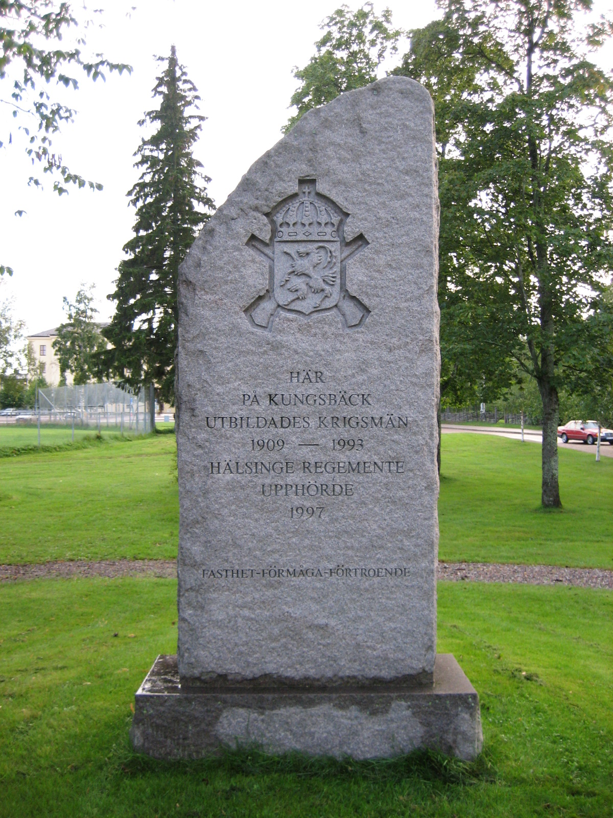 Minnesmärket över Hälsinge regemente, Gävle. (The Hälsinge regemente memorial monument, Gävle, Sweden.)